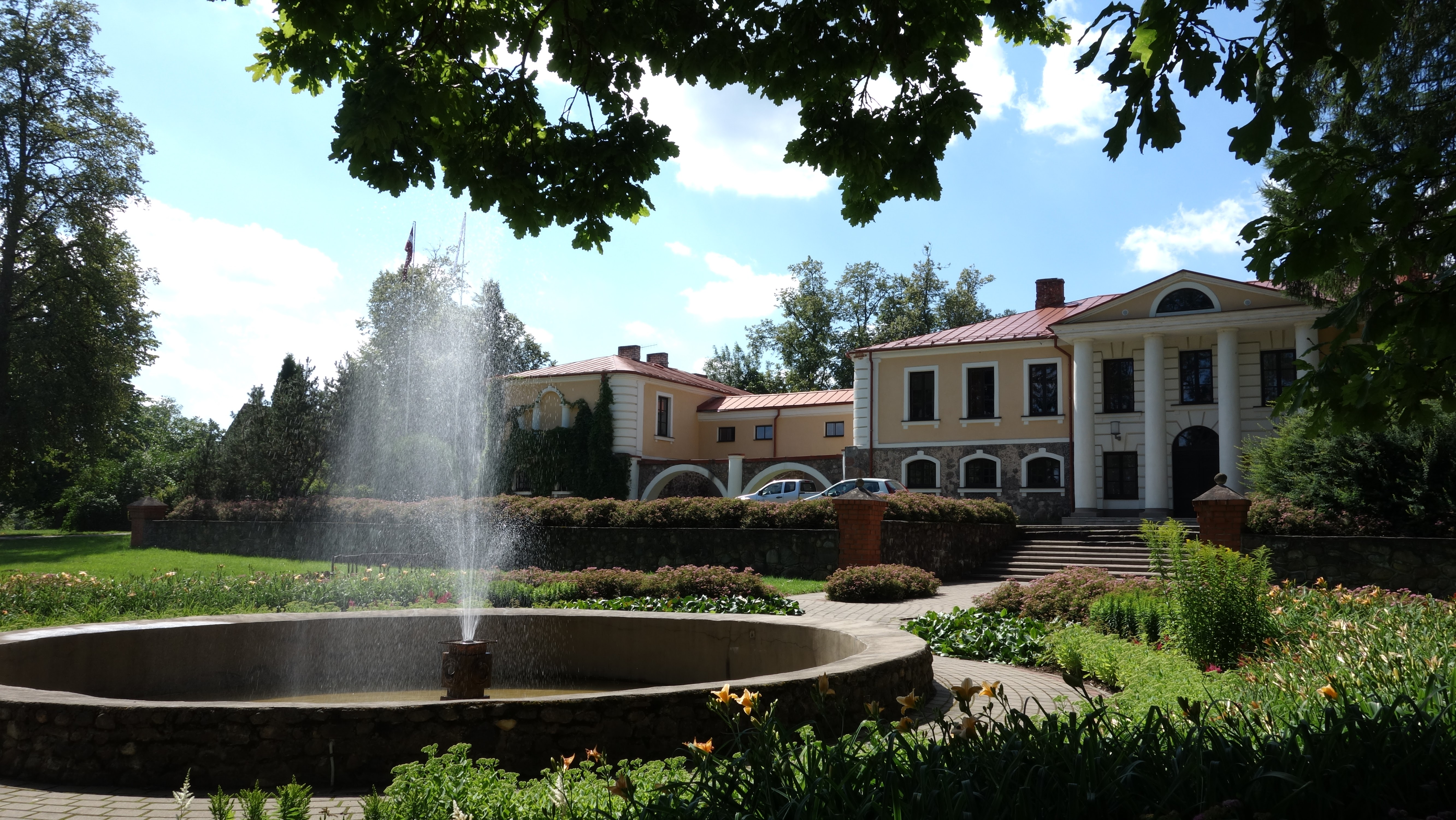 Vecpiebalga mõisa peahoone 2015. aastal.